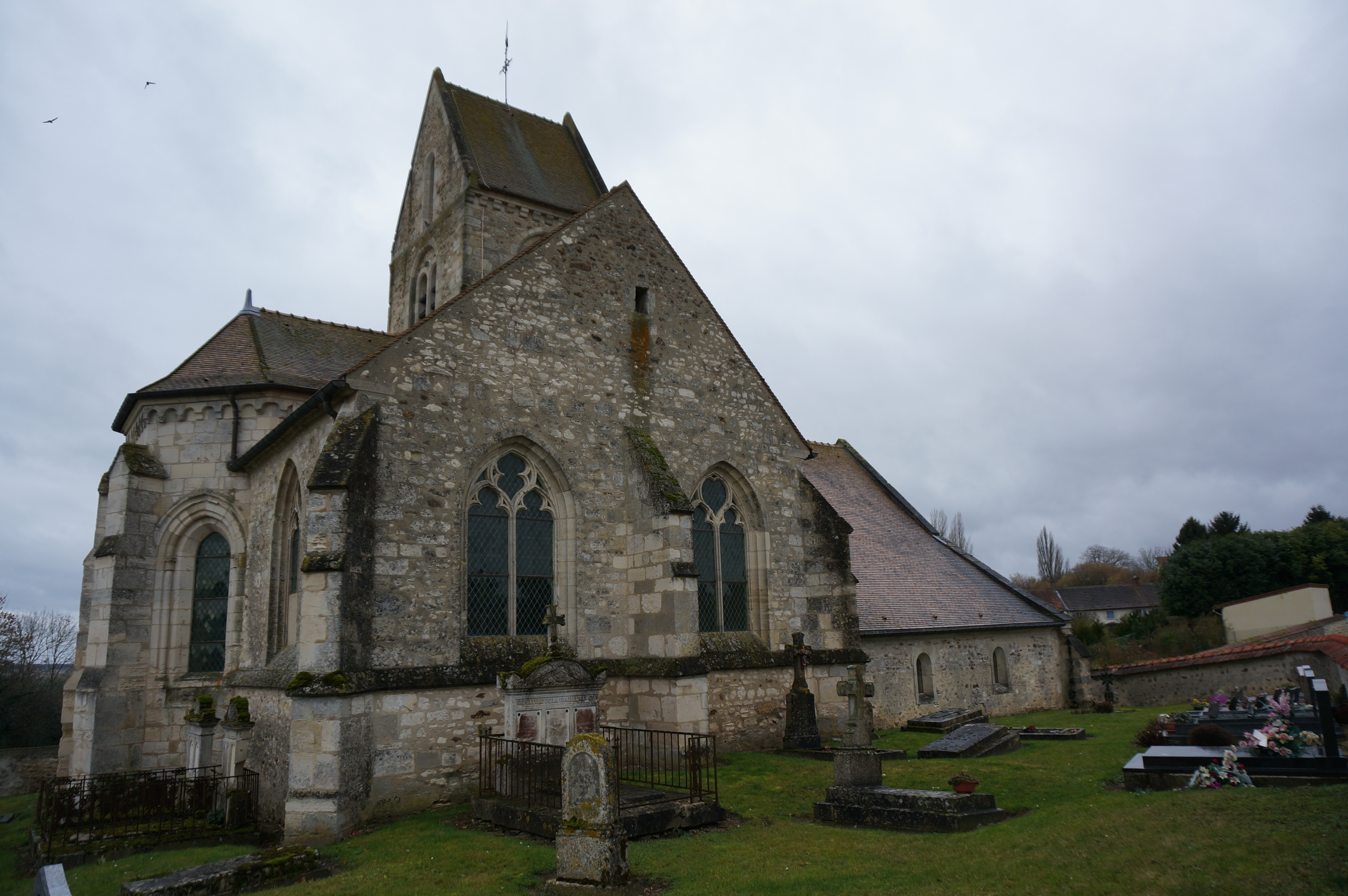 vue de l'église d'Aougny.